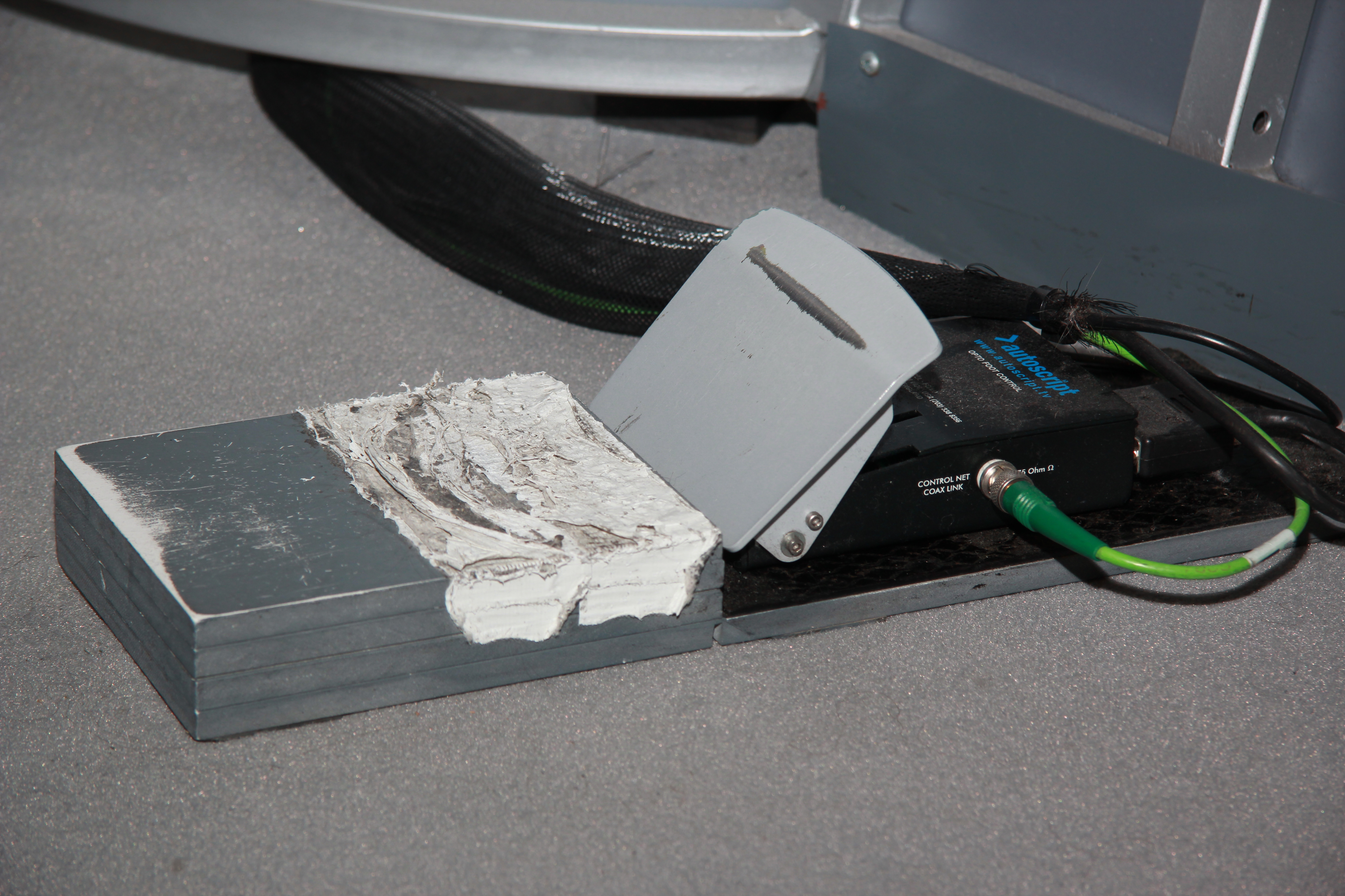 ORF-Landesstudio Salzburg